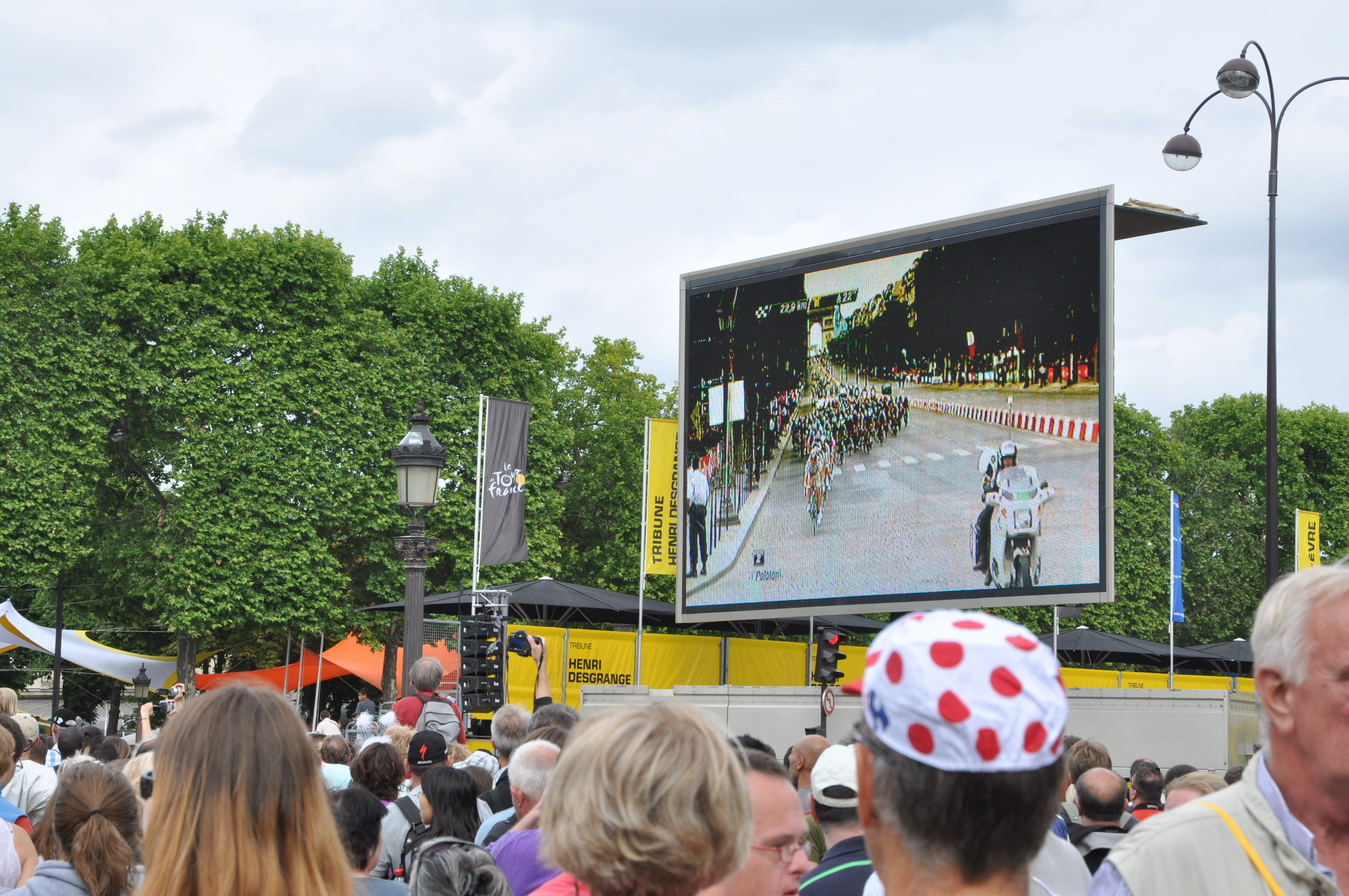 Champs-Élysées stage, 2010 Tour de France.